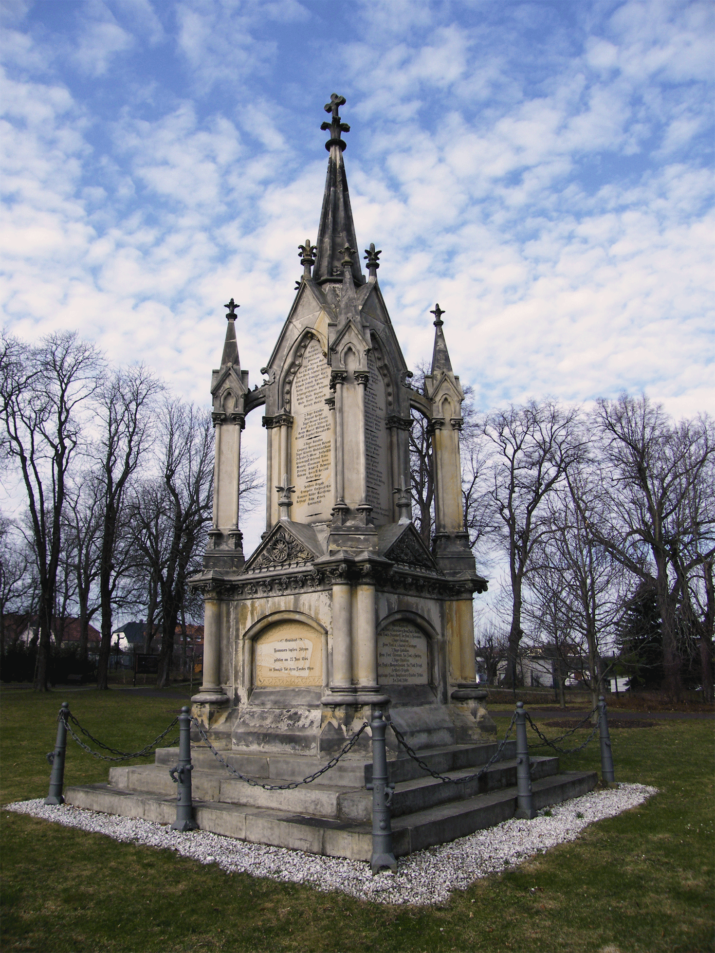 Nach der Schlacht bei Langensalza 1866 entstand auf dem Gelände hinter der Gottesackerkirche ein Ehrenfriedhof. 1868 wurde das Hannoveraner-Denkmal zur Erinnerung an die Opfer dieser Schlacht aufgestellt.